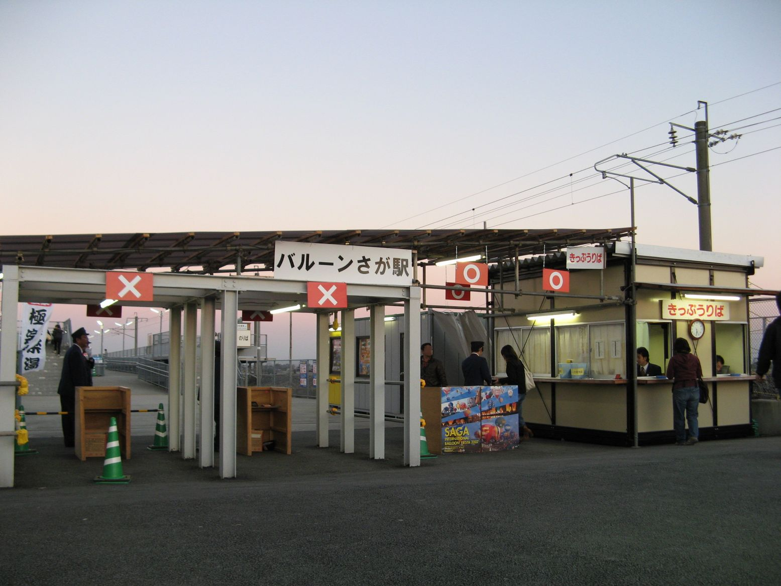 バルーンさが駅 仮設駅舎 2007年11月2日 Bakkai撮影